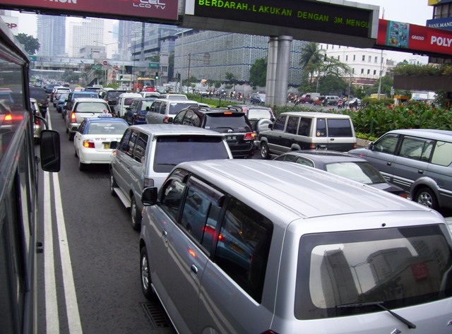 Traffic jam in Sudirman street, Jakarta, Indonesia